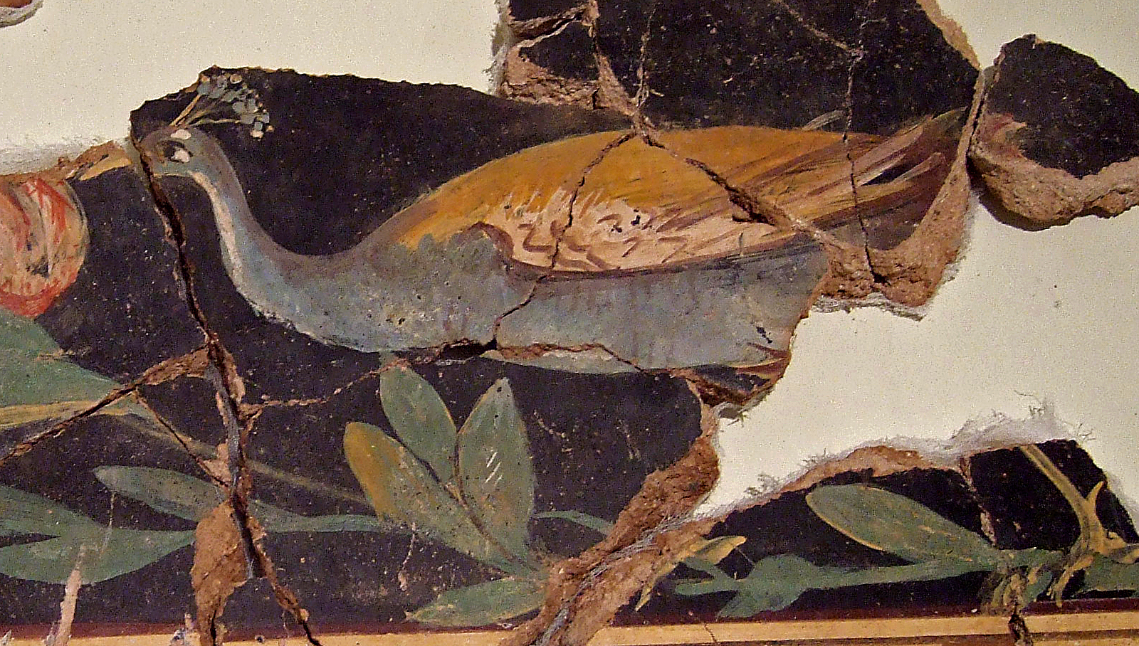 Museo de Calatayud - Friso del Pavo Real - Restos de pintura - Primera mitad del siglo I ddC - Bílbilis, Barrio de las termas - Insula I, Domus 3. stancia 29